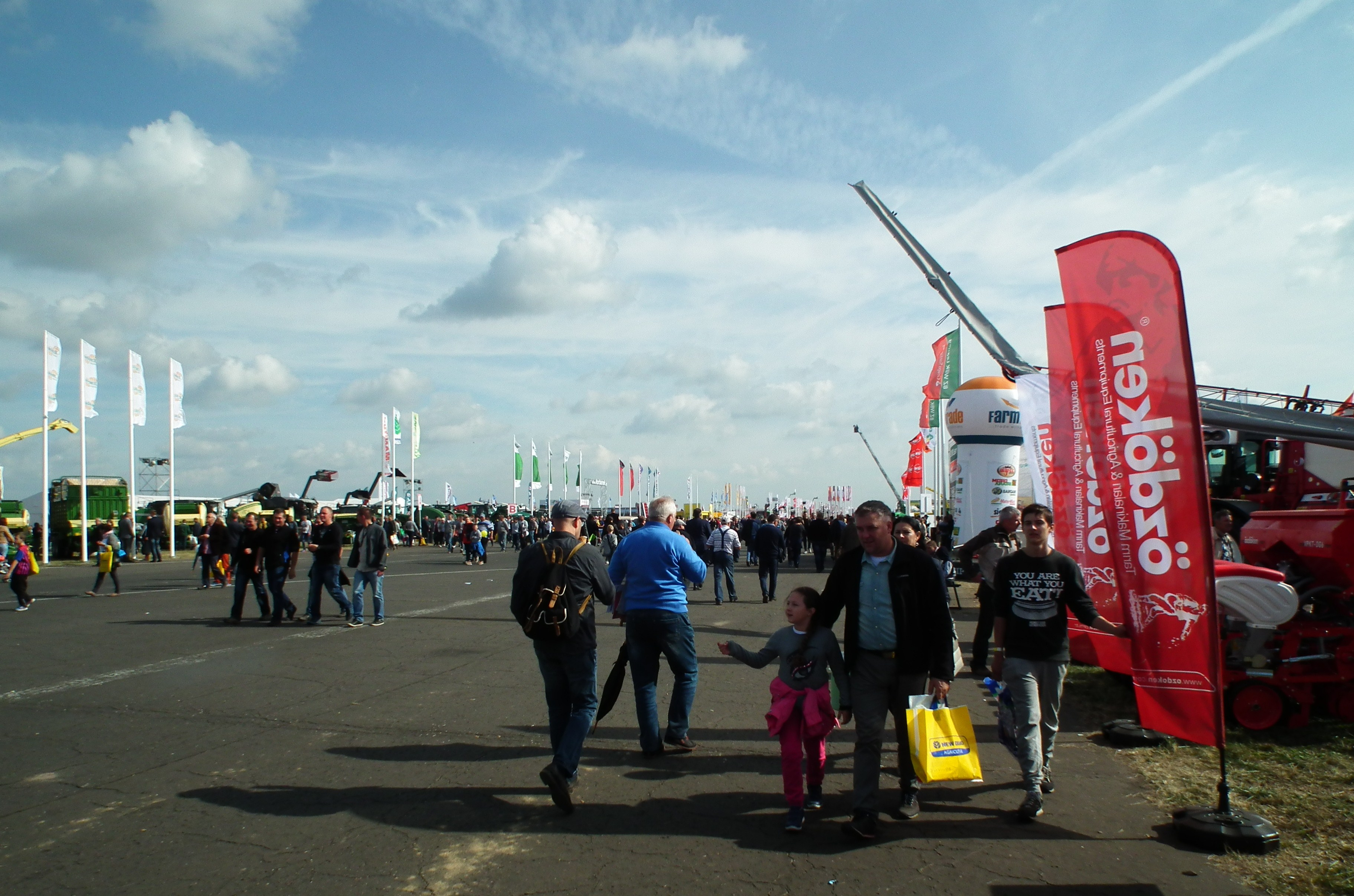 AgroShow w Bednarach w 2016r.